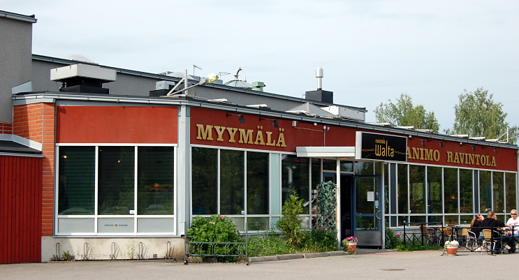 Nokian Panimon tehtaanmyymälä ja panimoravintola Walta.